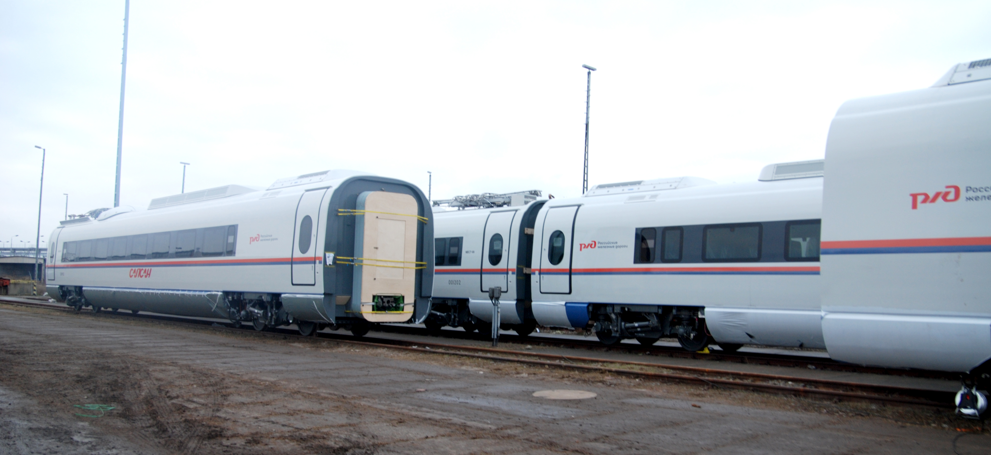 Der Velaro RUS bei Auslieferung in Sassnitz / Mukran im Januar 2009